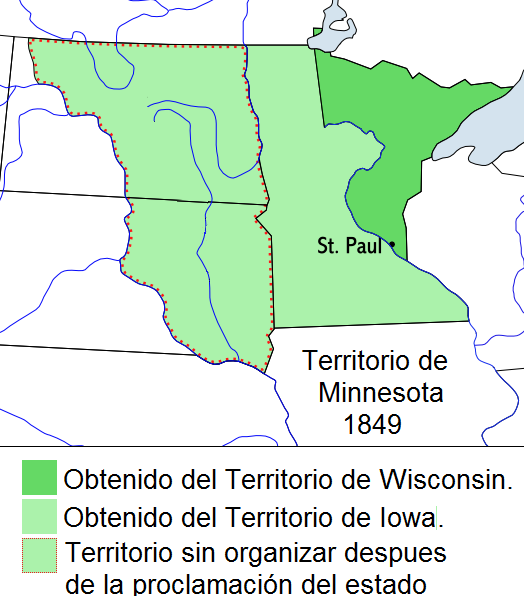 Mapa del territorio de Minnesota transcribido al español (Tomado de :File:Minnesotaterritory.PNG)